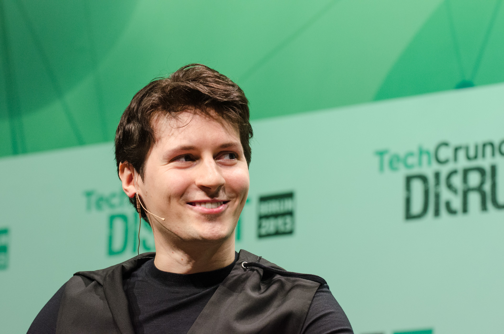 Pawel Walerjewitsch Durow